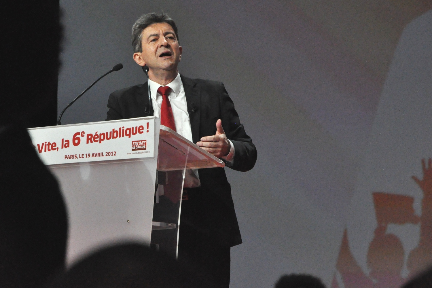 Le 19 avril 2012, Jean-Luc Mélenchon a tenu un dernier meeting avant le premier tour de la présidentielle, au Parc des expositions de la porte de Versailles. Le candidat du Front de Gauche y a scellé le "serment de la porte de Versailles", serment d'union après la présidentielle, réunissant sur scène toutes les composantes du Front de Gauche à travers leurs porte-paroles.